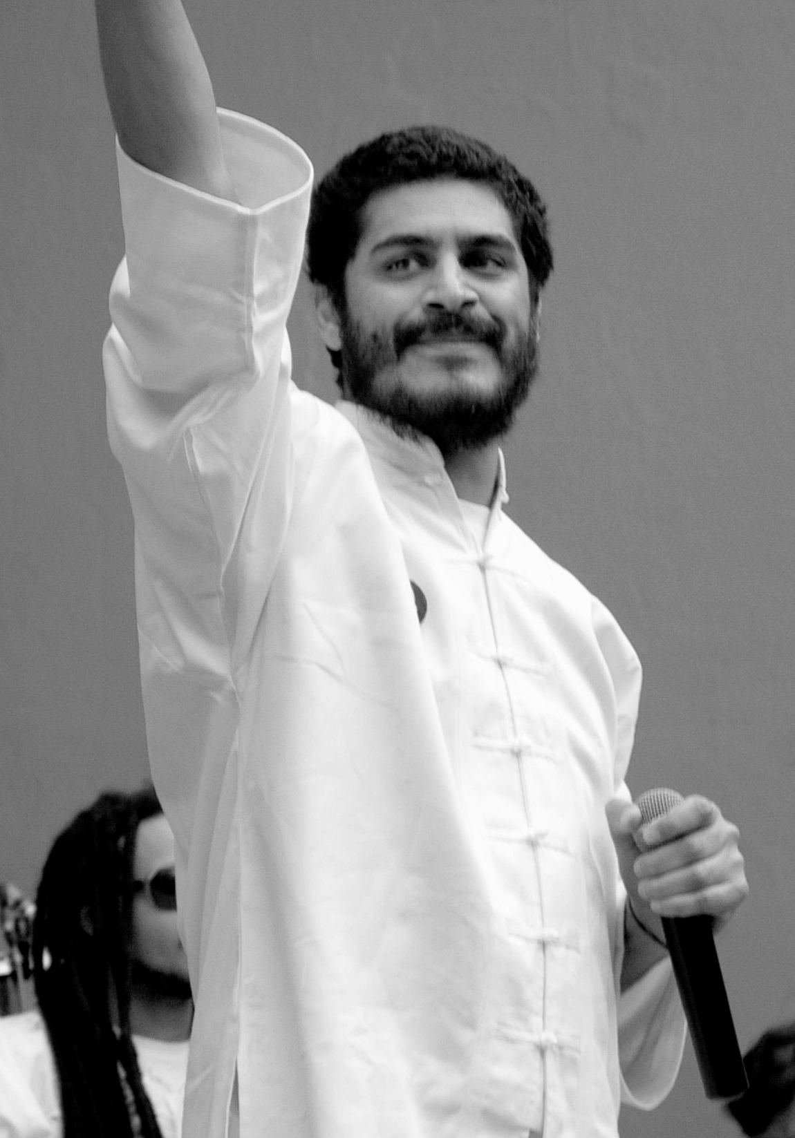 Show do Criolo no Parque da Aclimação em 2011.